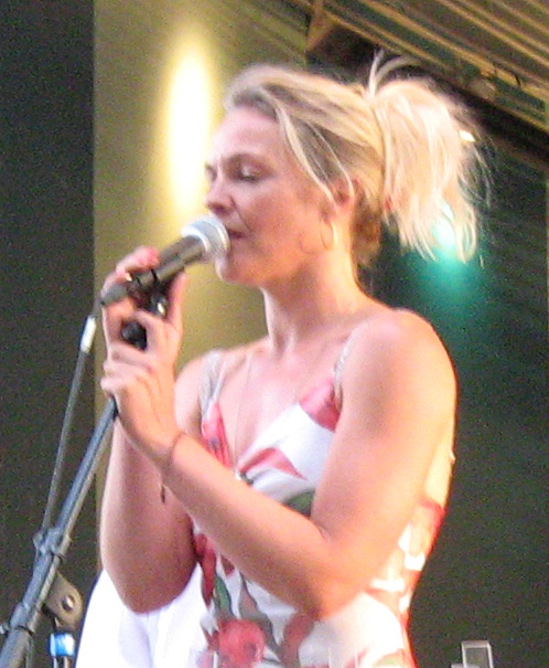 Trine Pallesen og Promenadeorkestret i Tivoli, København. 9. august 2009.